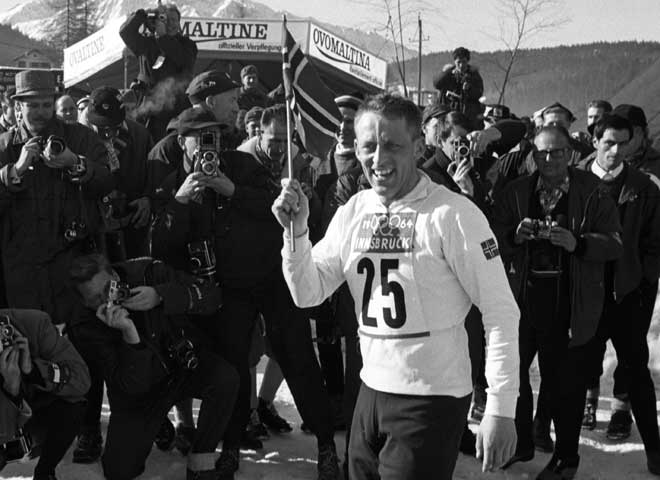 TORMOD KNUDSEN: Tok kombinertgull i Innsbruck i 1964.